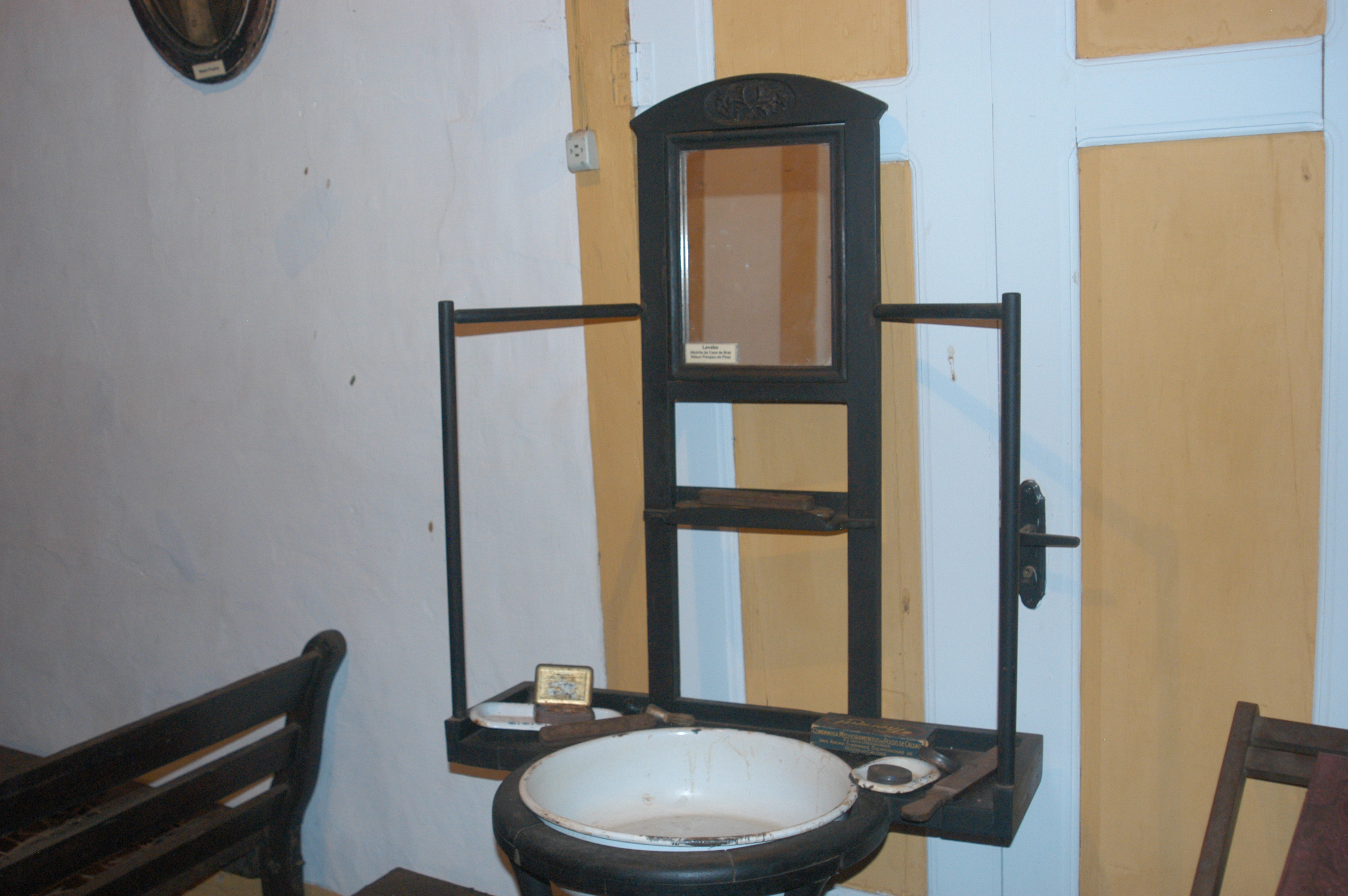 penteadeira antiga exposta no museu da familia pompeu, em pirenopolis, go, brasil